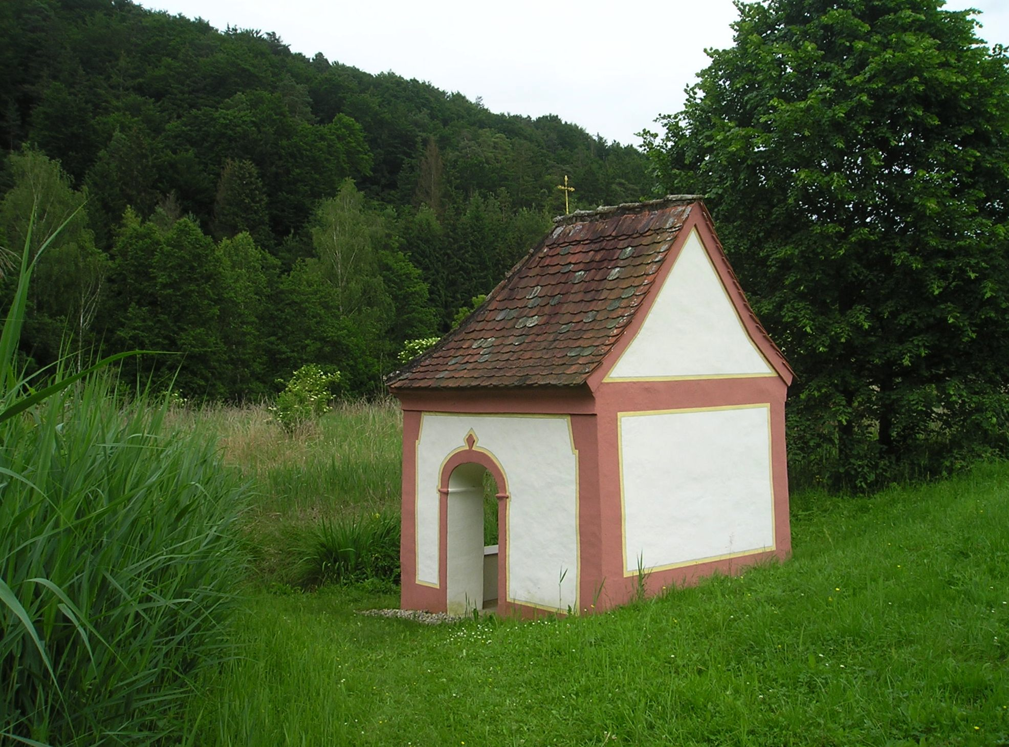 St. Helena-Kapelle im Schambachtal bei Arnsberg, Landkreis Eichstätt (Oberbayern)